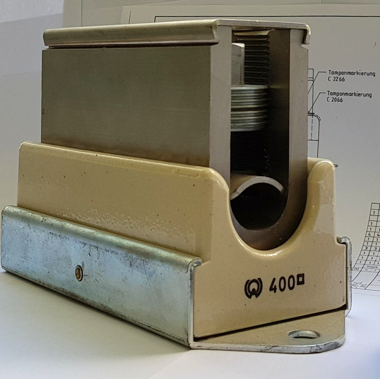 400mm2 Hochleistungs Schraubklemme von Woertz AG